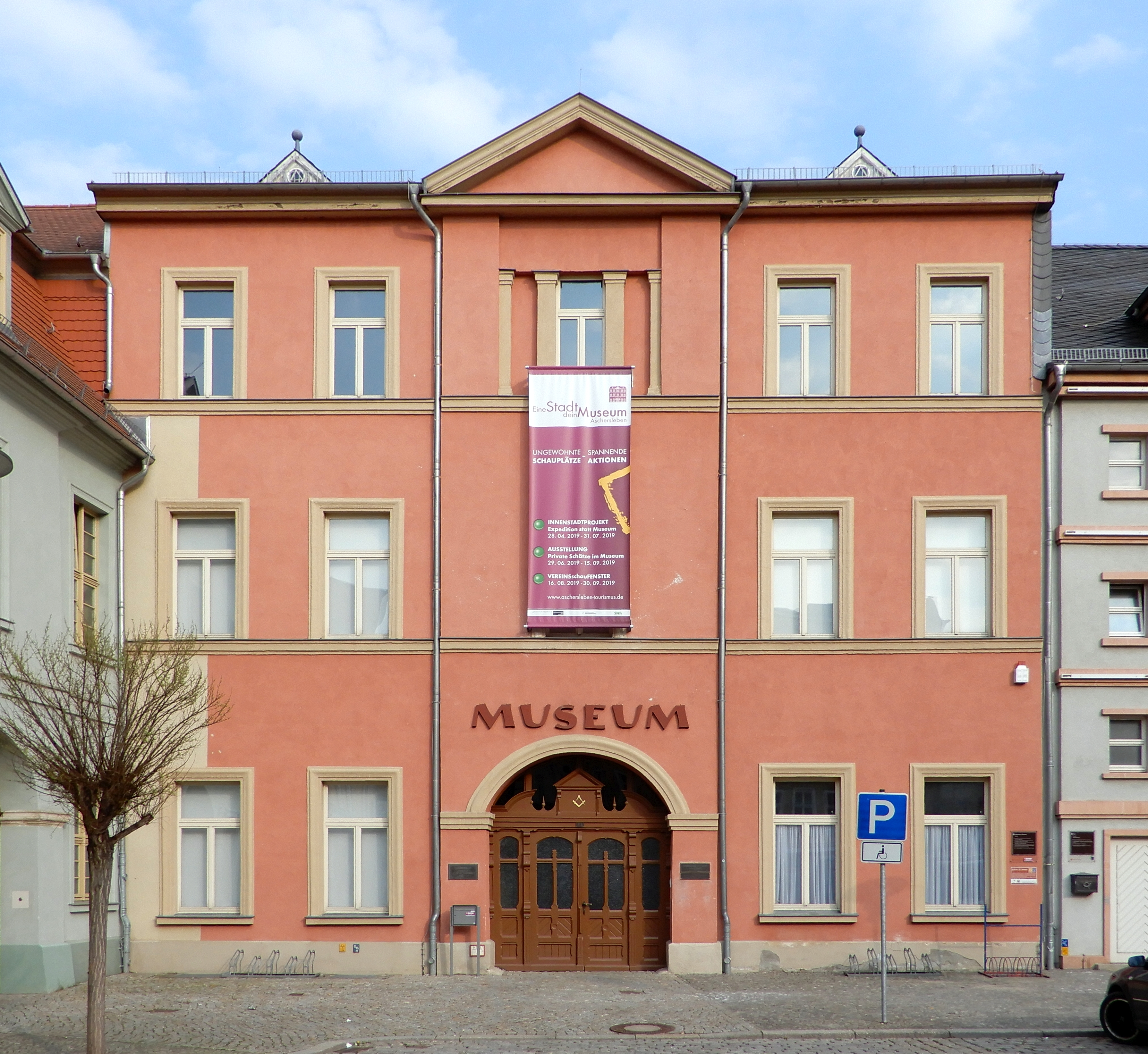 Gebäude Markt 21 in Aschersleben